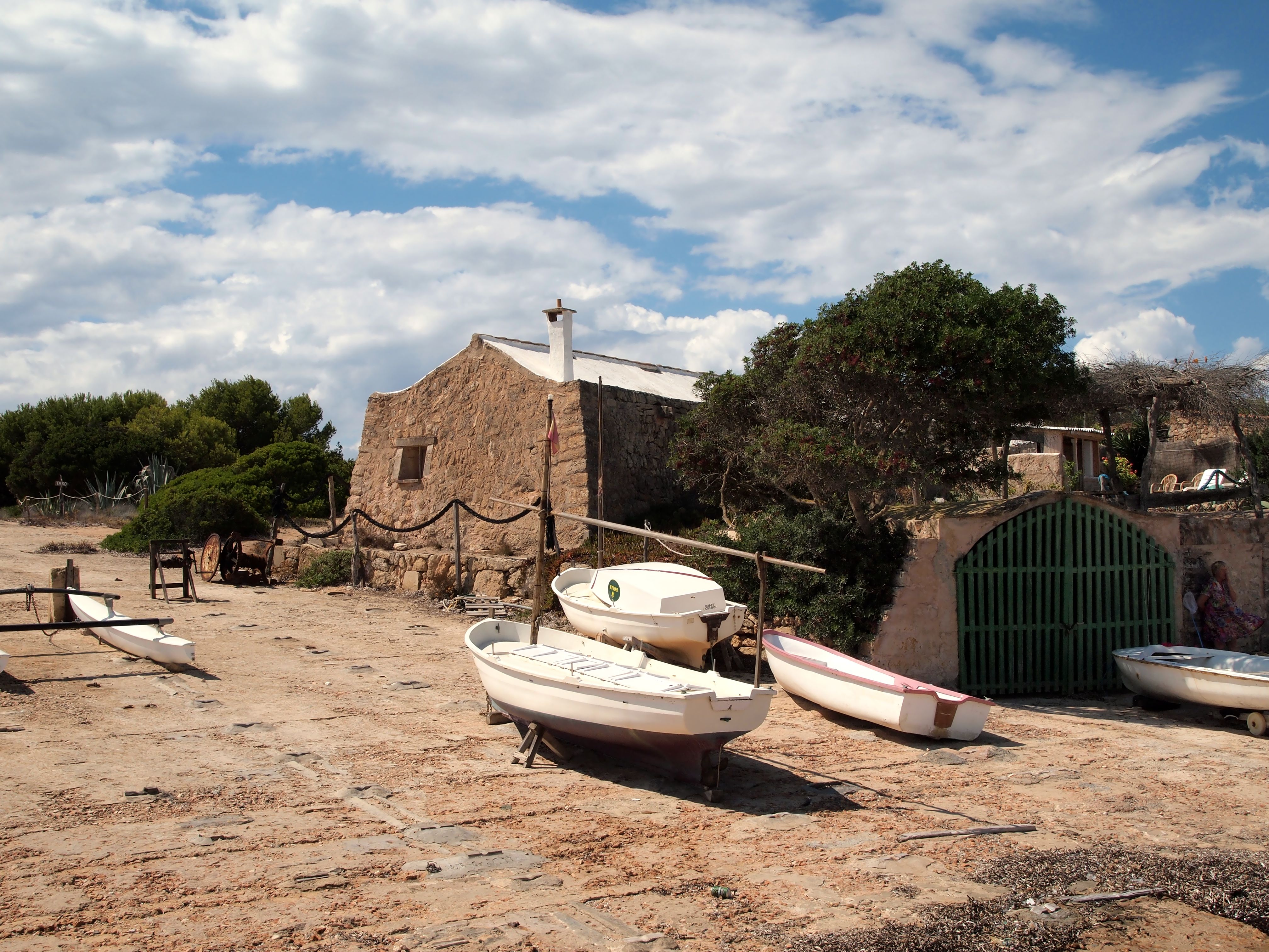 Poblat de pescador de S'Estelella amb el varador en primer pla, un escar i vàries barraques.